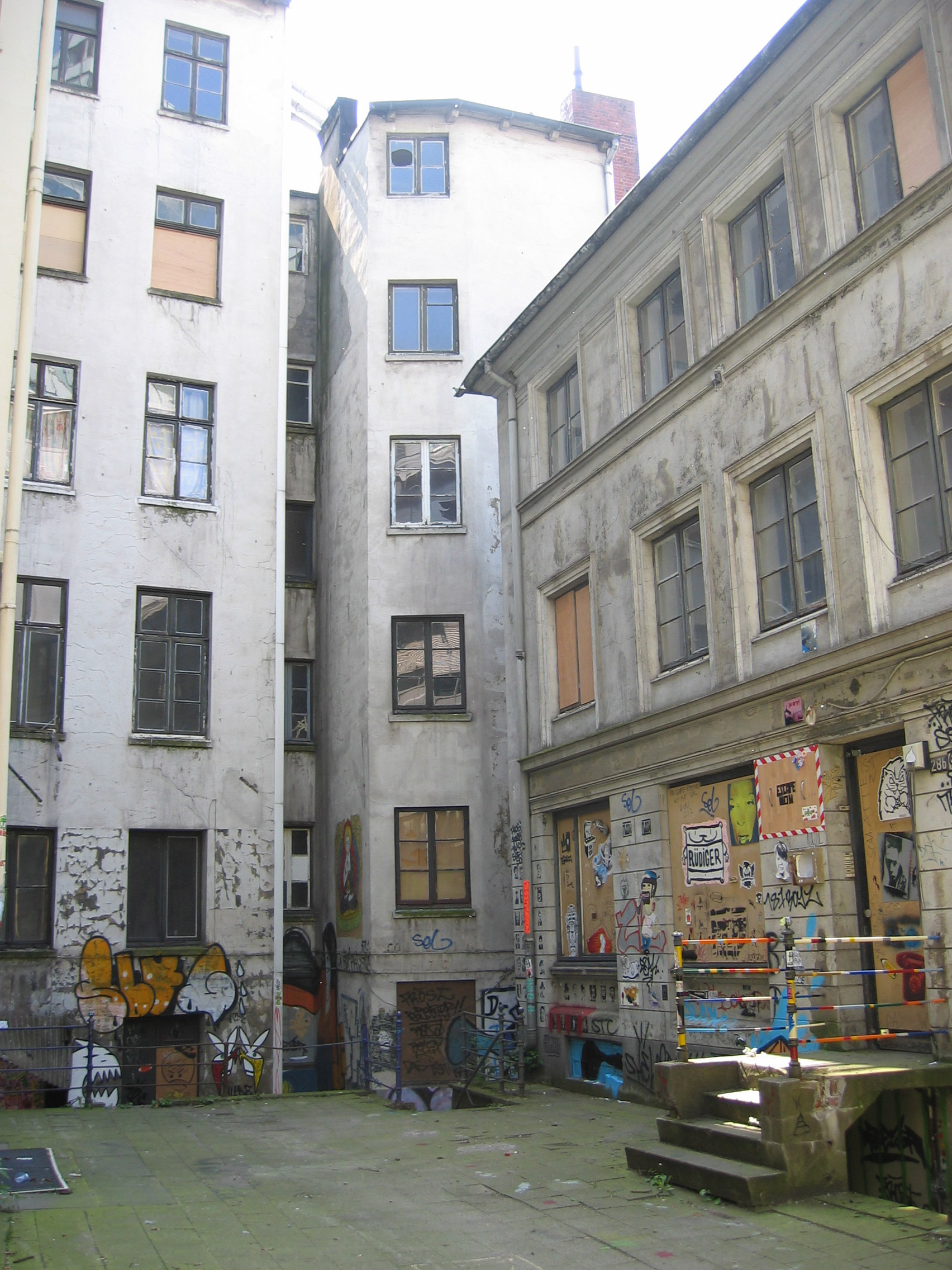 Entmieteter Hinterhof (Kutscherhof) in der Speckstraße, April 2009.